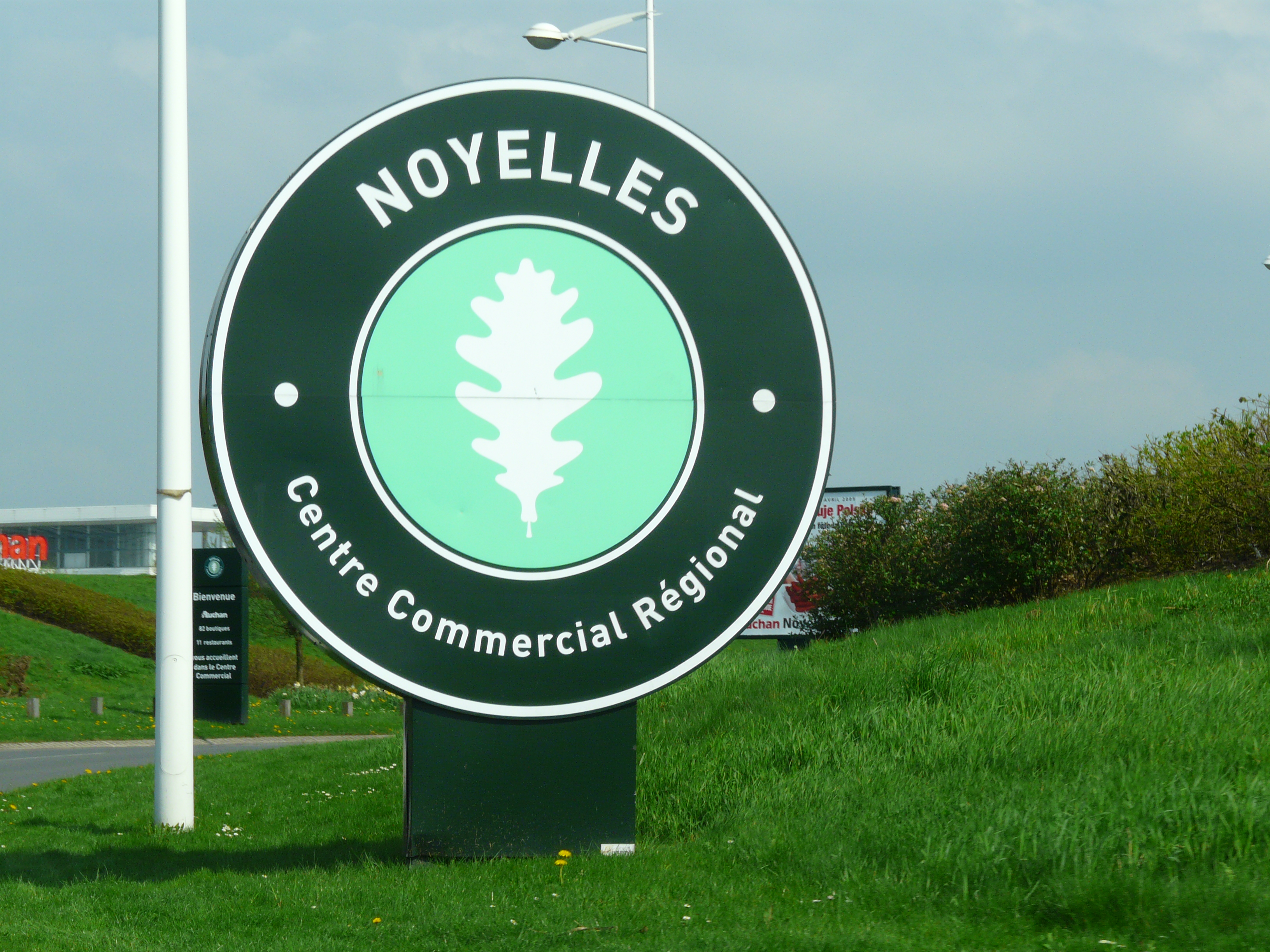 Panneau d'entrée d'Auchan Noyelles-Godault